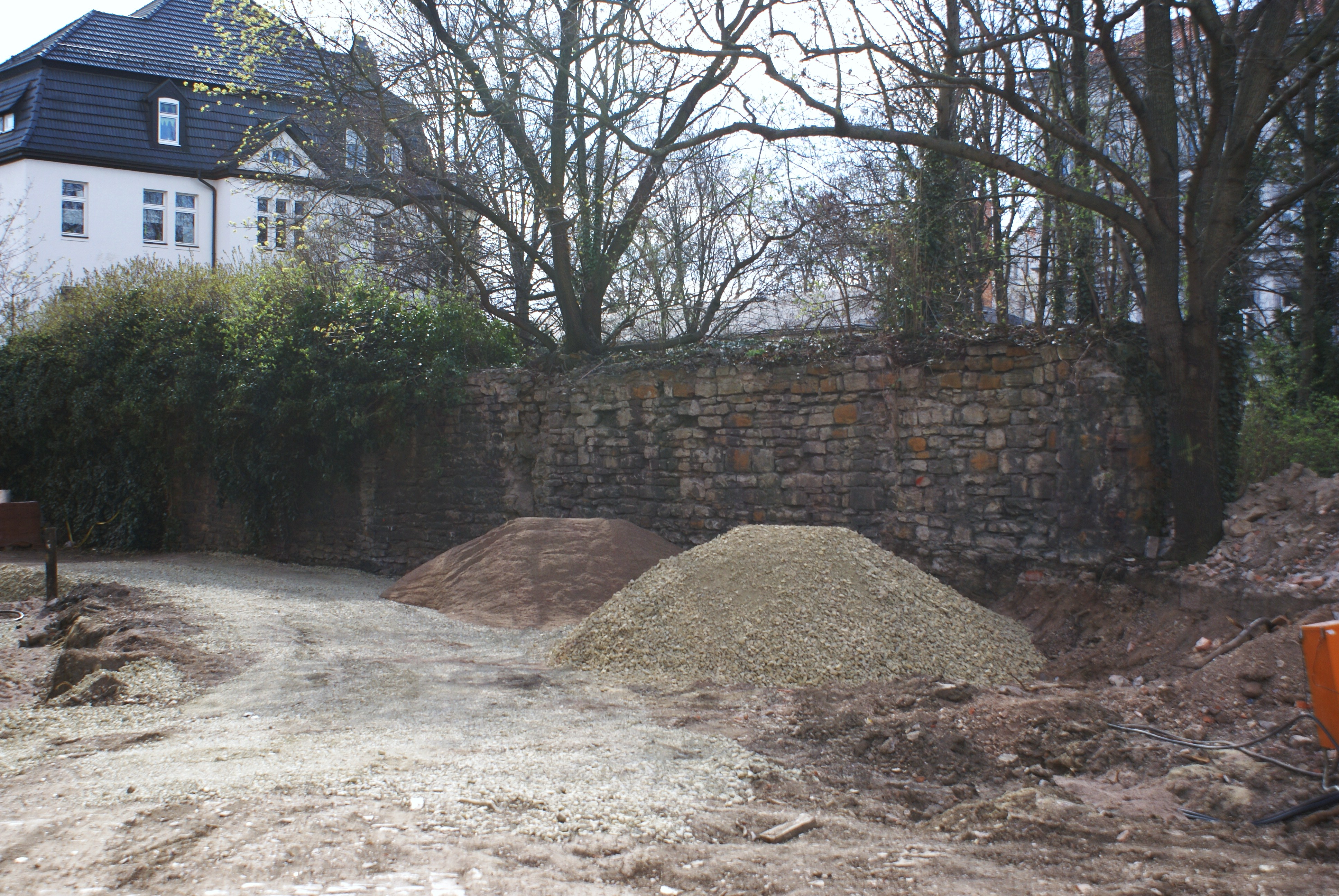 Reste des stadtseitigen Mauerrings der inneren Stadtbefestigung auf dem Gelände der Evangelische Grundschule (alte Orthopädische Klinik) in der Regierungsstraße in Erfurt.